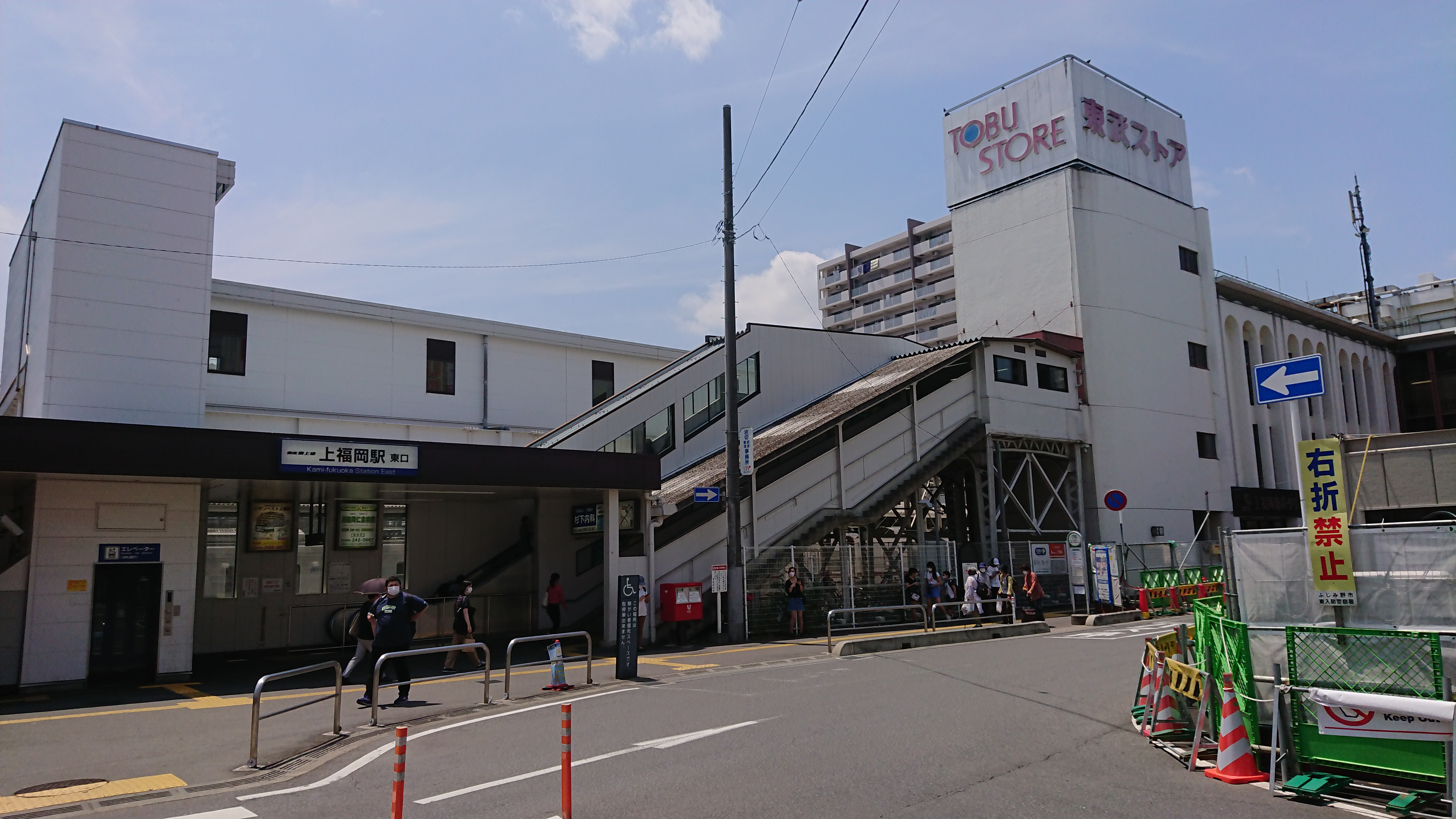 埼玉県ふじみ野市所在の東武鉄道東上本線上福岡駅東口で撮影